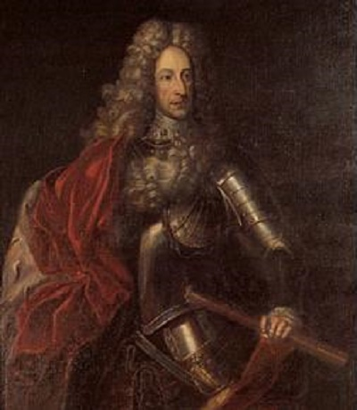 Ludwig Wilhelm von Baden (1655-1707) Das Bild des "TÜRKENLOUIS" ist zeitgenössisch, also u.U. gemeinfrei. Es hängt als Original-Gemälde im Jagdschloss FAVORITE der Markgräfin Sibylla Augusta Markgräfin von Baden in der Nähe von Rastatt und wird bei den Schloss-Führungen dort im Sommerhalbjahr gezeigt